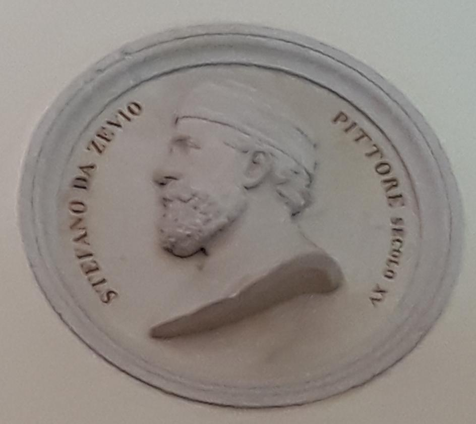 Effige di Stefano da Zevio